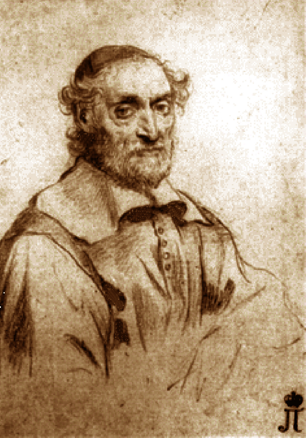 Nicolas-Claude Fabri de Peiresc né à Belgentier